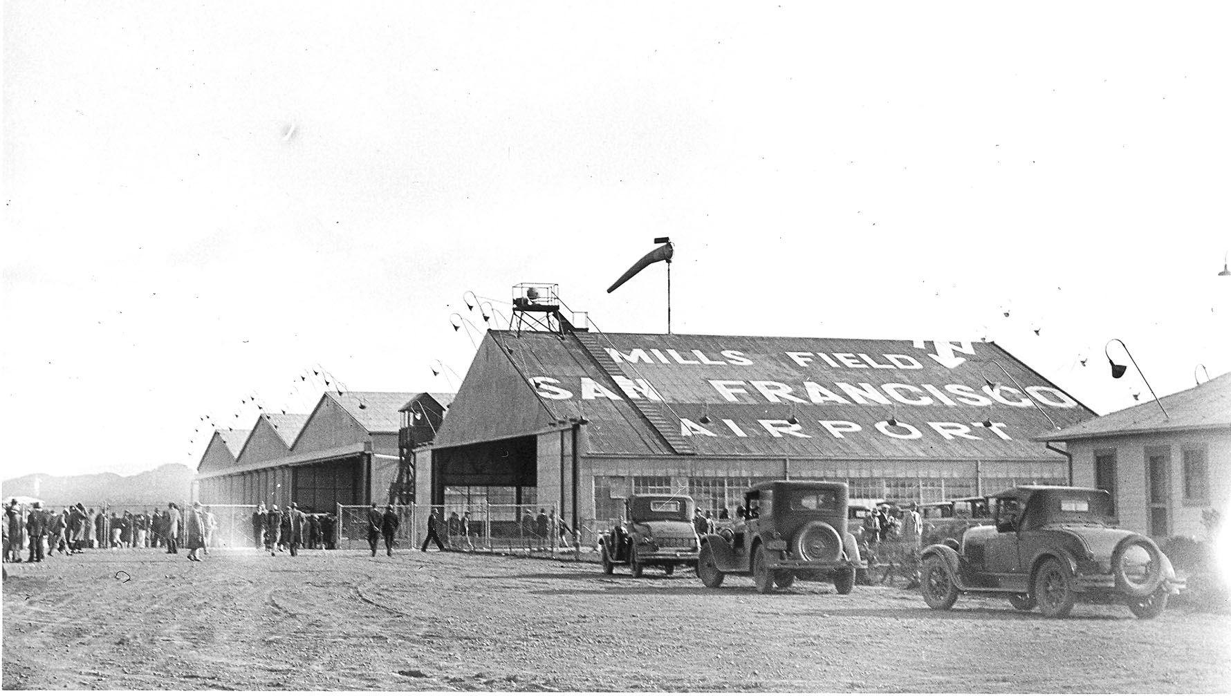 MillsField1928-1